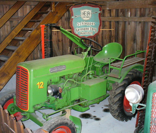 Hermann Lanz Aulendorf, Hela-Dieseltraktor D12 mit 12 PS (ursprüngliche Angabe: 22 PS), gebaut um 1956, Kreisfreilichtmuseum Bad Schussenried-Kürnbach